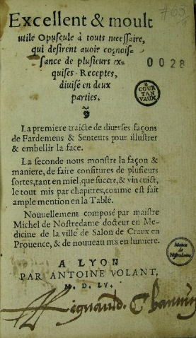 Nostradamus, Excellent ... opuscule, 1555, title page